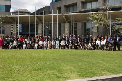 Reunión de los miembros de Parlamericas en Perú